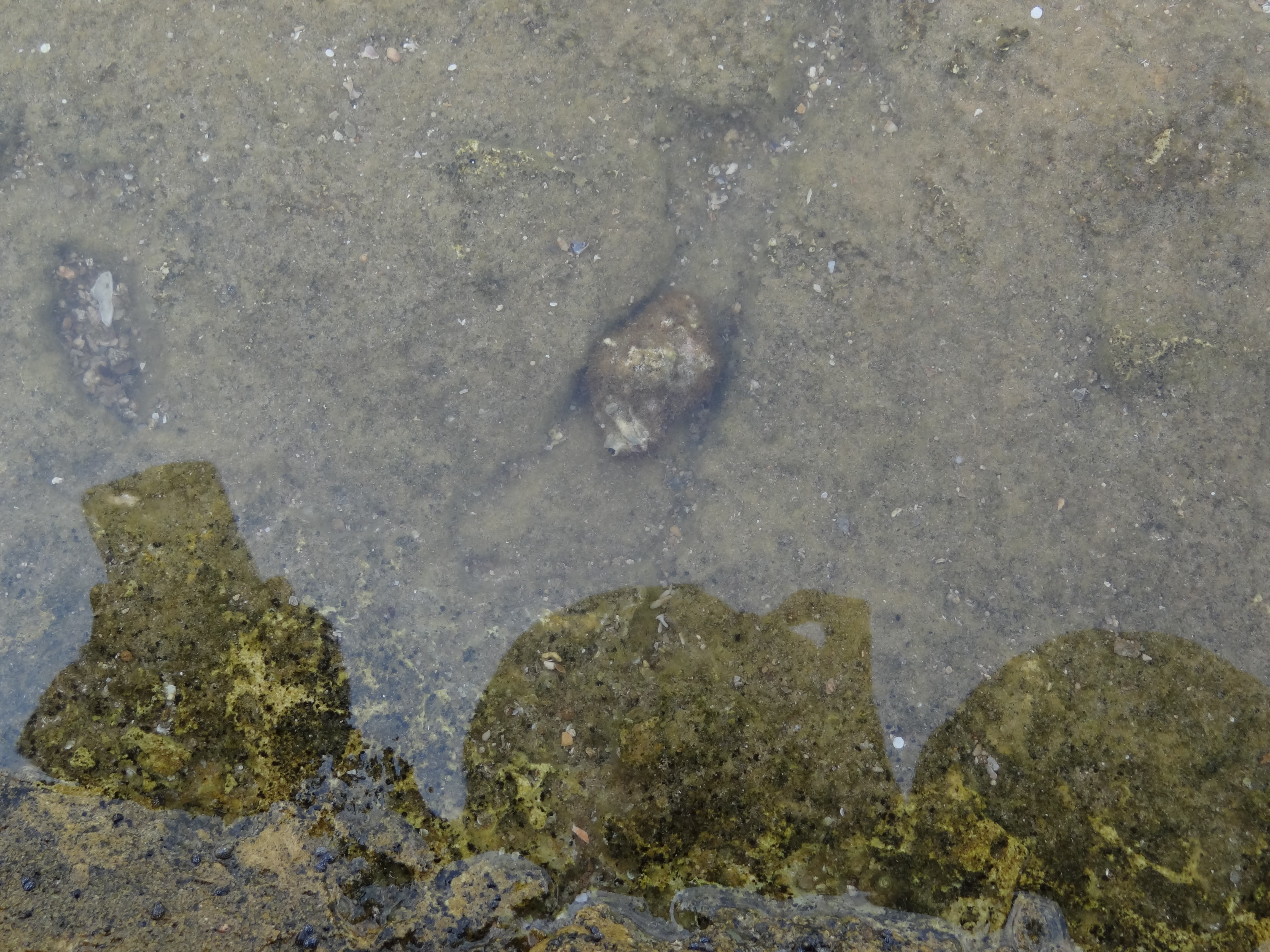 Hexaplex trunculus is a medium-sized species of sea snail was found on the north part of Israeli coastal plain near Tel Shikmona ארגמון קהה קוצים הוא חילזון ימי טורף ממשפחת הארגמוניים. החילזון חשוב מבחינה היסטורית והלכתית מכיוון ששימש להפקת הצבעים ארגמן ותכלת. בנוסף החילזון משמש למאכל באיטליה, ספרד, יוון ופורטוגל. החילזון החי נמצא בחוף הים במישור החוף הצפוני מול תל שקמונה שנמצאו בהשרידי מבני תעשיה ששימוש כנראה ליצור צבע הארגמן מארגמונים החילזון הוחזר למים לאחר הצילומים